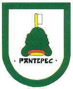 Glifo de Pantepec